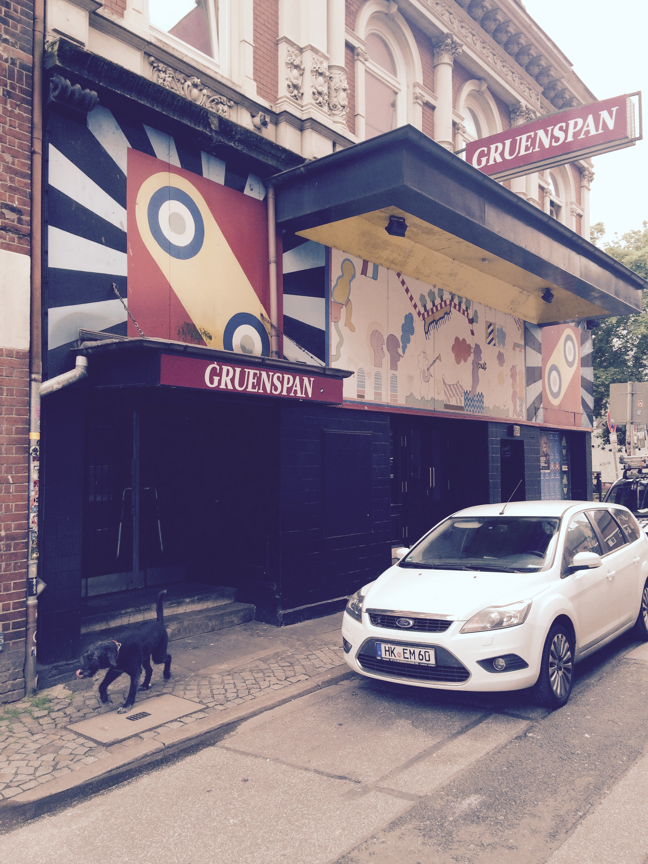 Eingang des GRUENSPAN, Hamburg St. Pauli